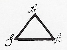 Zeichen der ordensfeindlichen Gesellschaften an der Universität Erlangen (Westfalen, Berliner, Ansbacher)